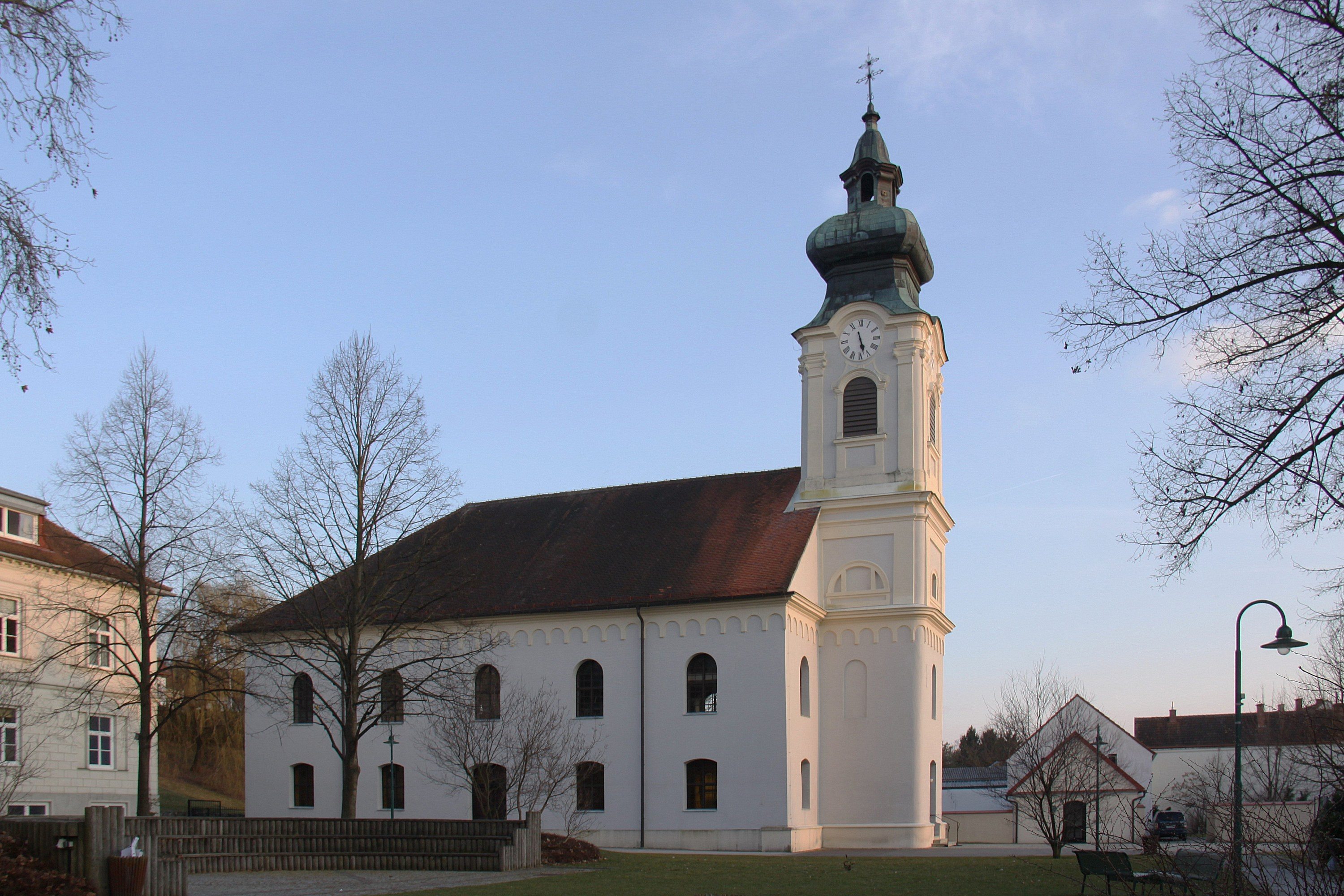 Denkmalgeschützte evangelische Pfarrkirche (A.B.) in Oberschützen. Object location47° 20′ 59.02″ N, 16° 12′ 29.79″ E